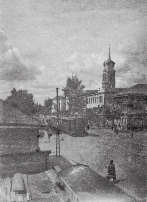 Колокольня Донской церкви. Перед ней — Горбольница №4